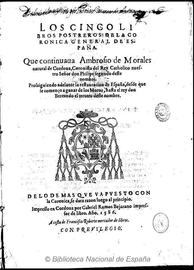 Crónica general de España Título: Los cinco libros postreros de la Coronica General de España que continuaua Ambrosio de Morales ... prossiguiendo adelante la restauracion de España, desde que se començo a ganar de los Moros, hasta el rey don Bermudo el tercero deste nombre ... Autor: Morales, Ambrosio de (1513-1591). Ocampo, Florián de (ca. 1499-ca. 1558). Fecha: 1586 Datos de edición: Impresso en Cordoua por Gabriel Ramos Bejarano ... a costa de Francisco Roberte, mercader de libros